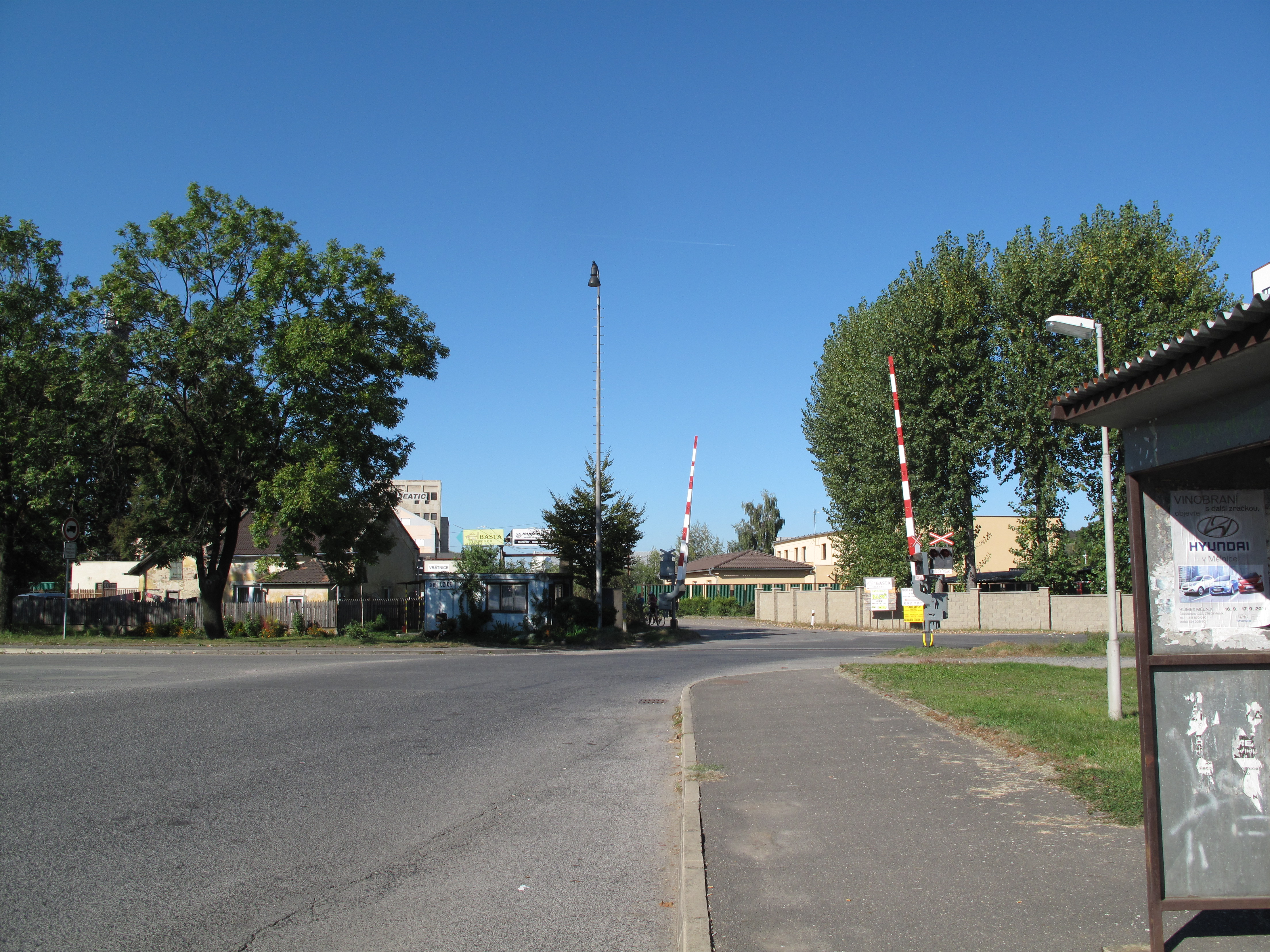 Úžice